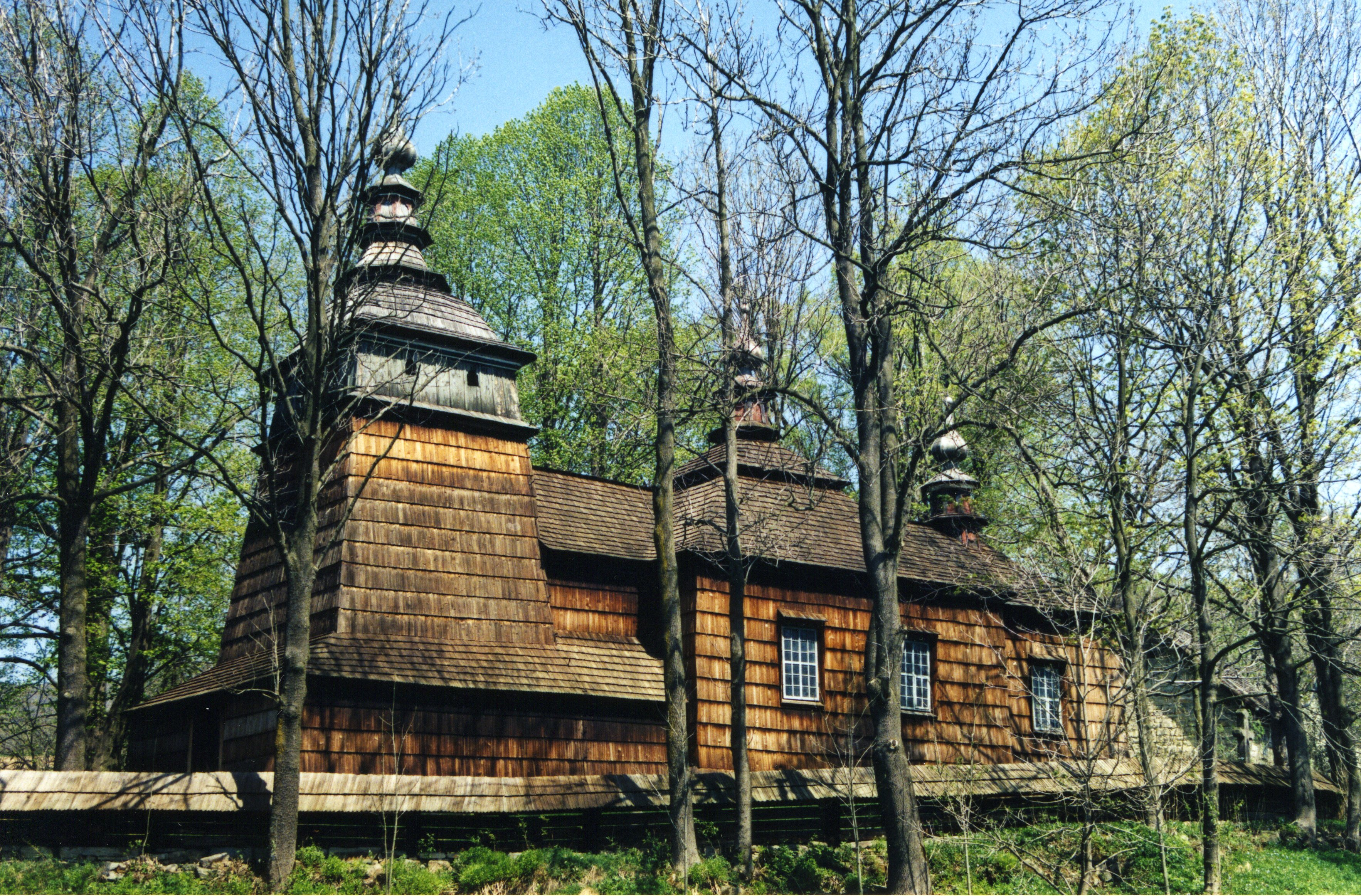 zespół cerkwi greko-kat., ob. muzeum, 1784